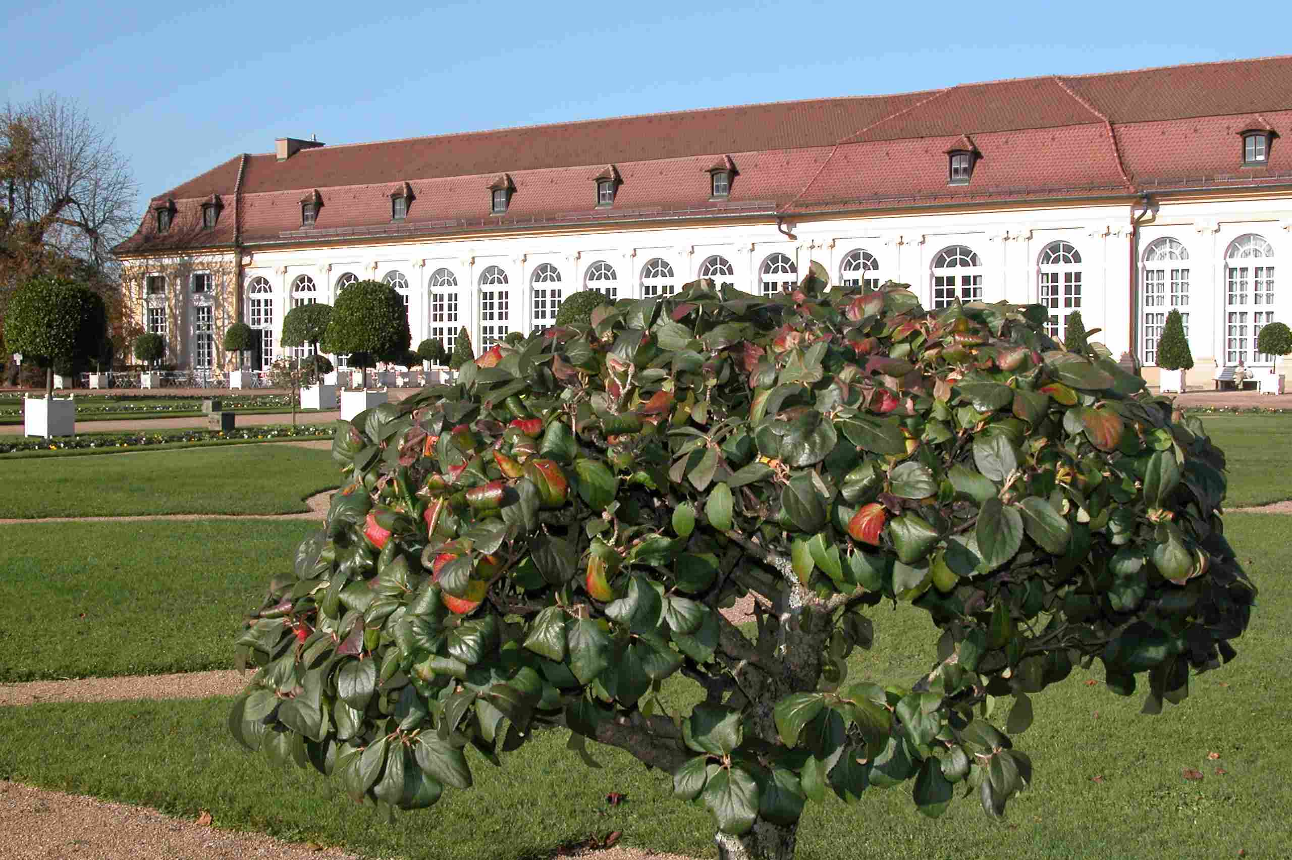 Orangerie Ansbach Aufnahmedatum: 03.11.2005 Koordinaten